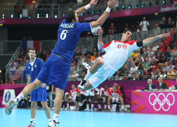 kamel alouini action